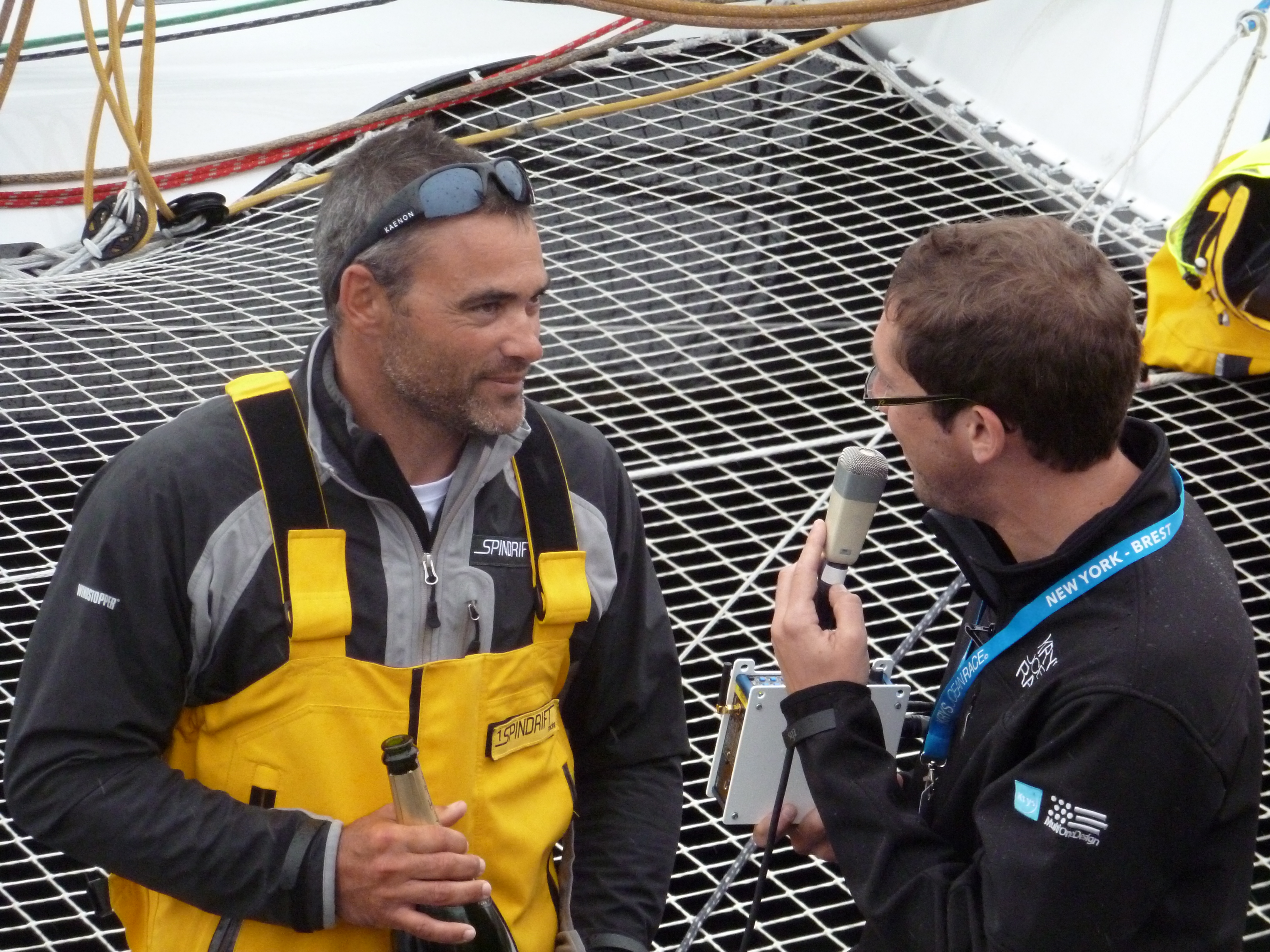 Yann Guichard, skipper du Spindrift Racing à son accostage à la marina du château à Brest le 13 juillet 2012.